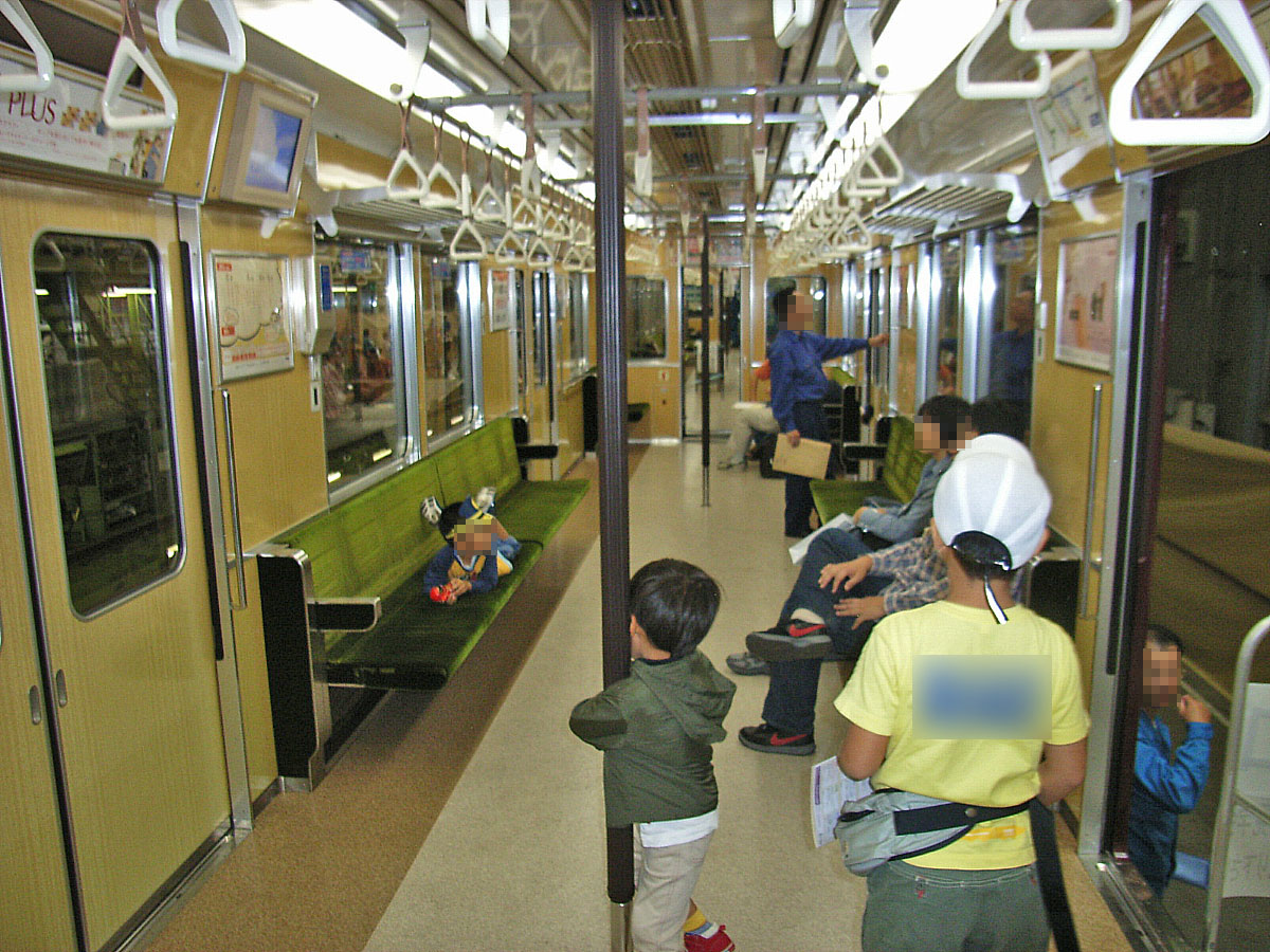 2005年10月 正雀車庫の公開時に撮影